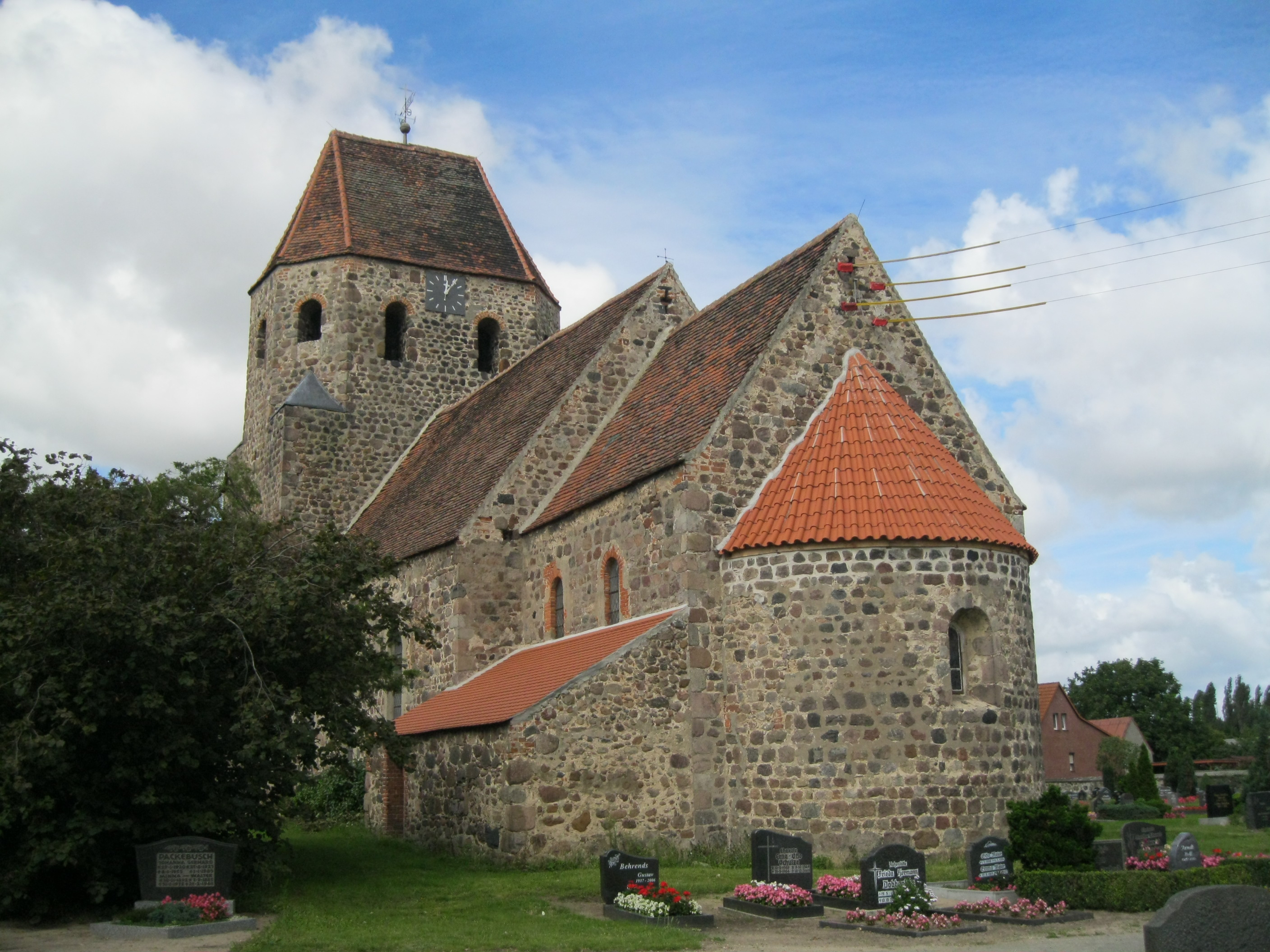 Wehrkirche Rochau